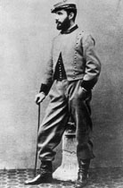 Giuseppe Abbati, photo